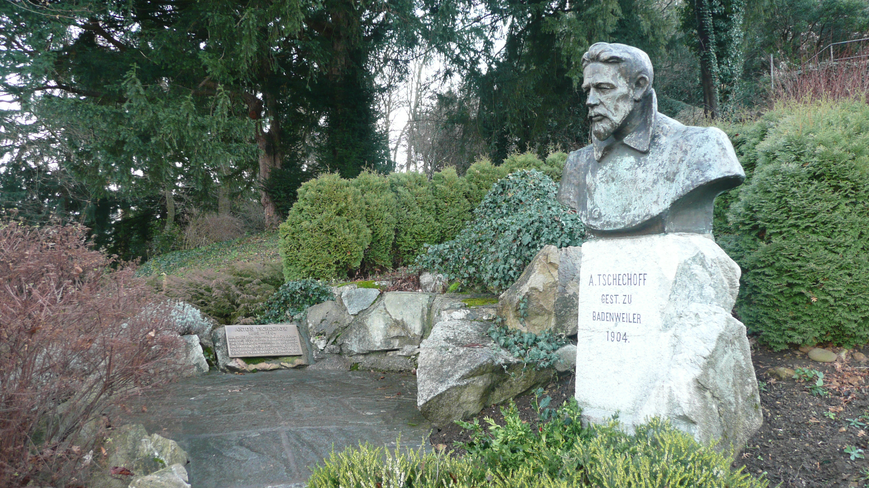 neues Anton Tschechow Denkmal in Badenweiler, errichtet 1992